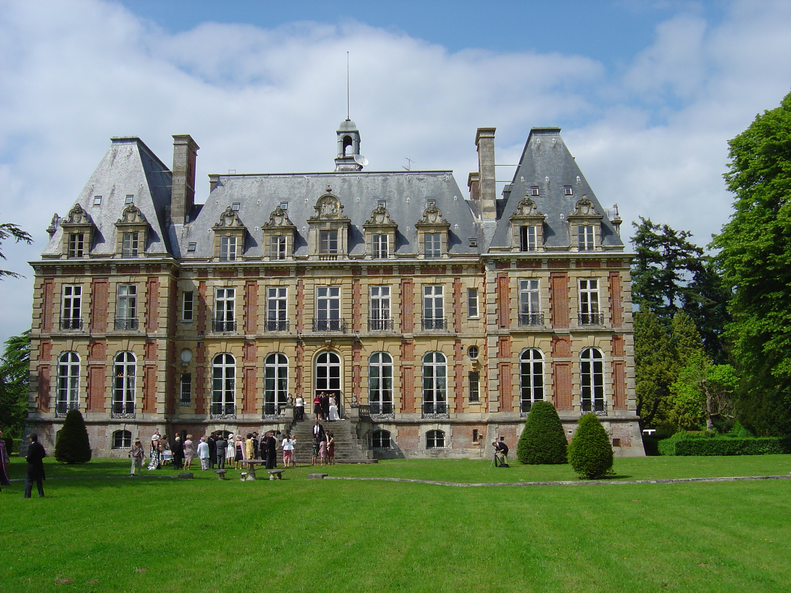 Le château de la Ferté-Frênel, Orne, France